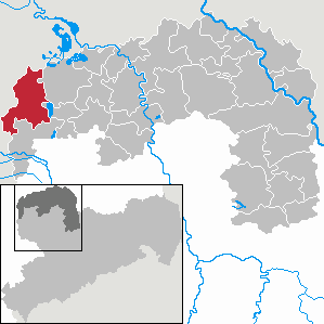 Wiedemar in Saxony - Landkreis Nordsachsen